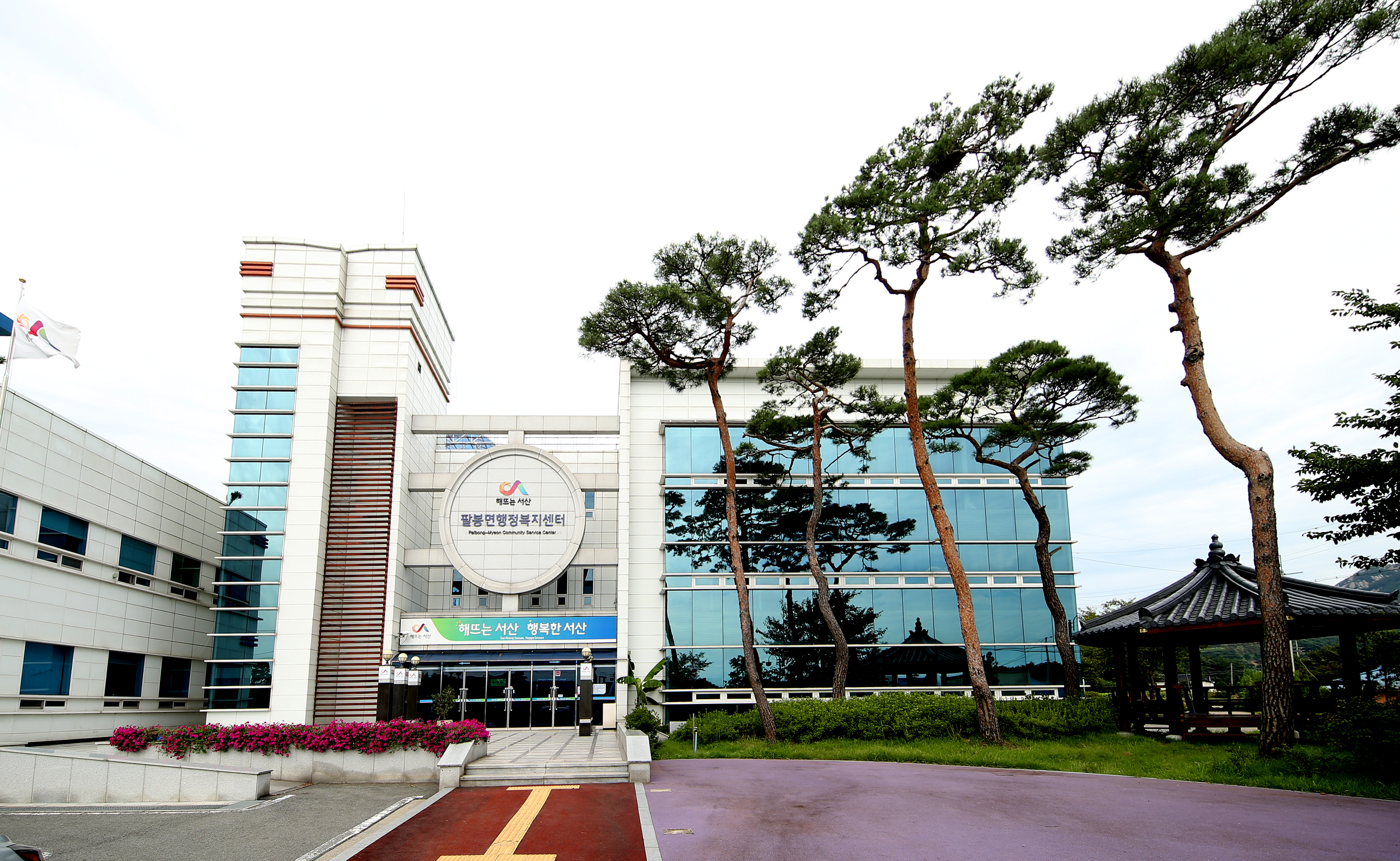 조선말: 충청남도 서산시 팔봉면 청사